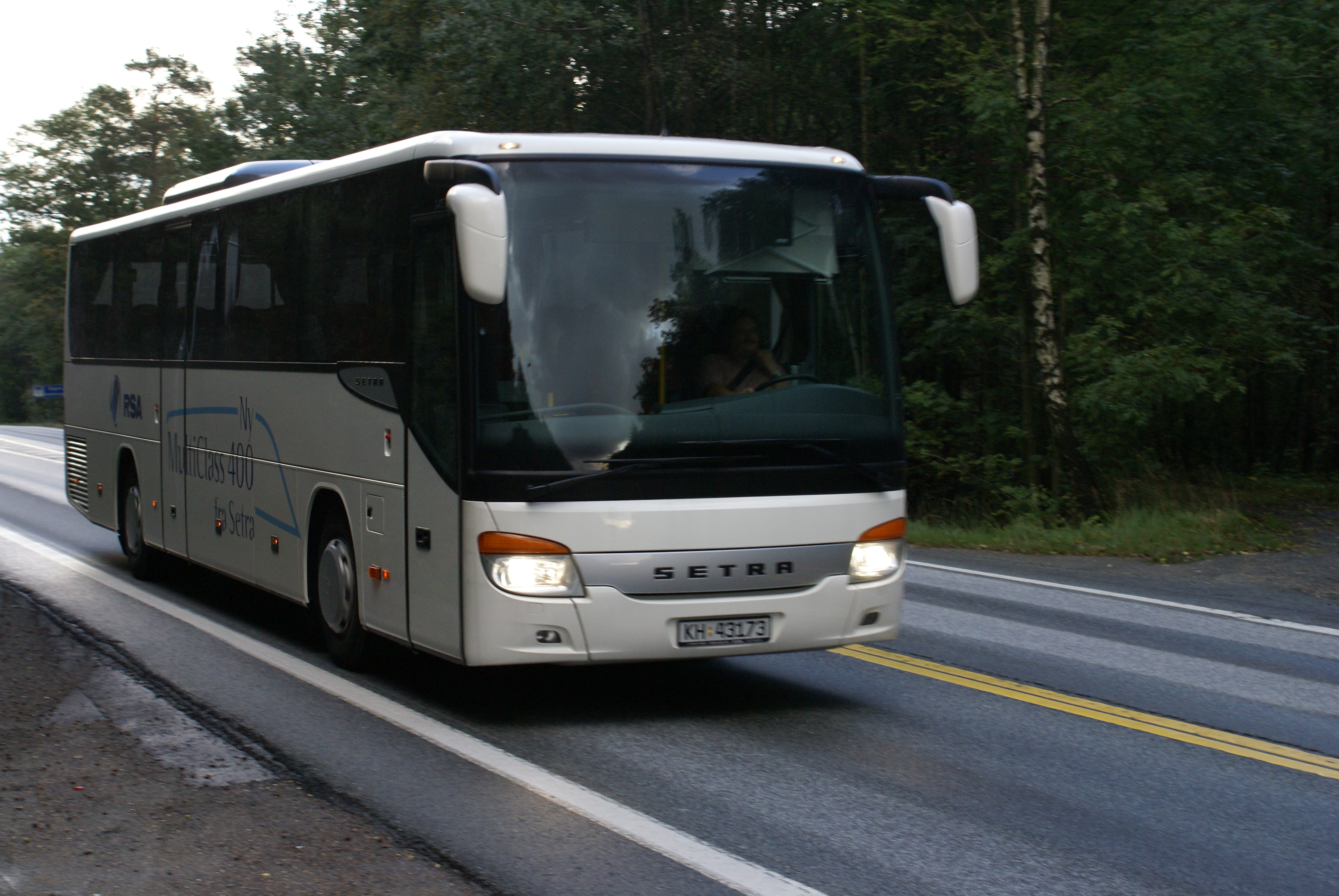 Norsk buss på E18 i Mandal